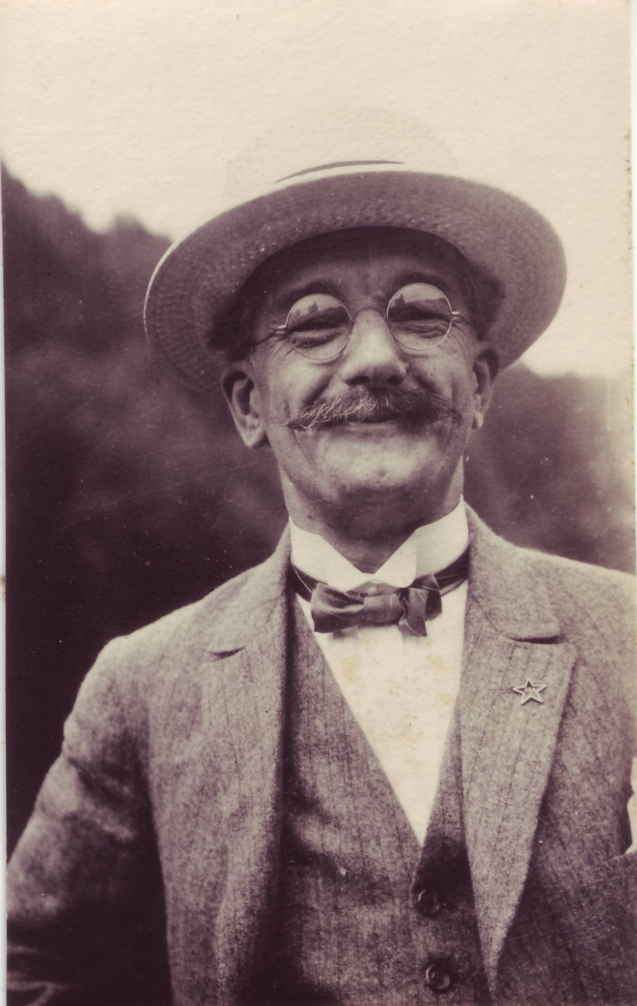 Portredo de s-ro Herbert Hammer, Zuriko, Svislando. Temas pri bildo, kiu estas propraĵo de Esperanto-Societo Zuriko. En mia funkico kiel ĝia prezidanto mi publikigas ĝin ĉi-tie laŭ la kondiĉoj de la GFDL-permesilo de GNU 1.2. Delemont.jpg Kategorio:Bildoj de svisaj esperantistoj Kategorio:Bildoj alŝutitaj de DidiWeidmann